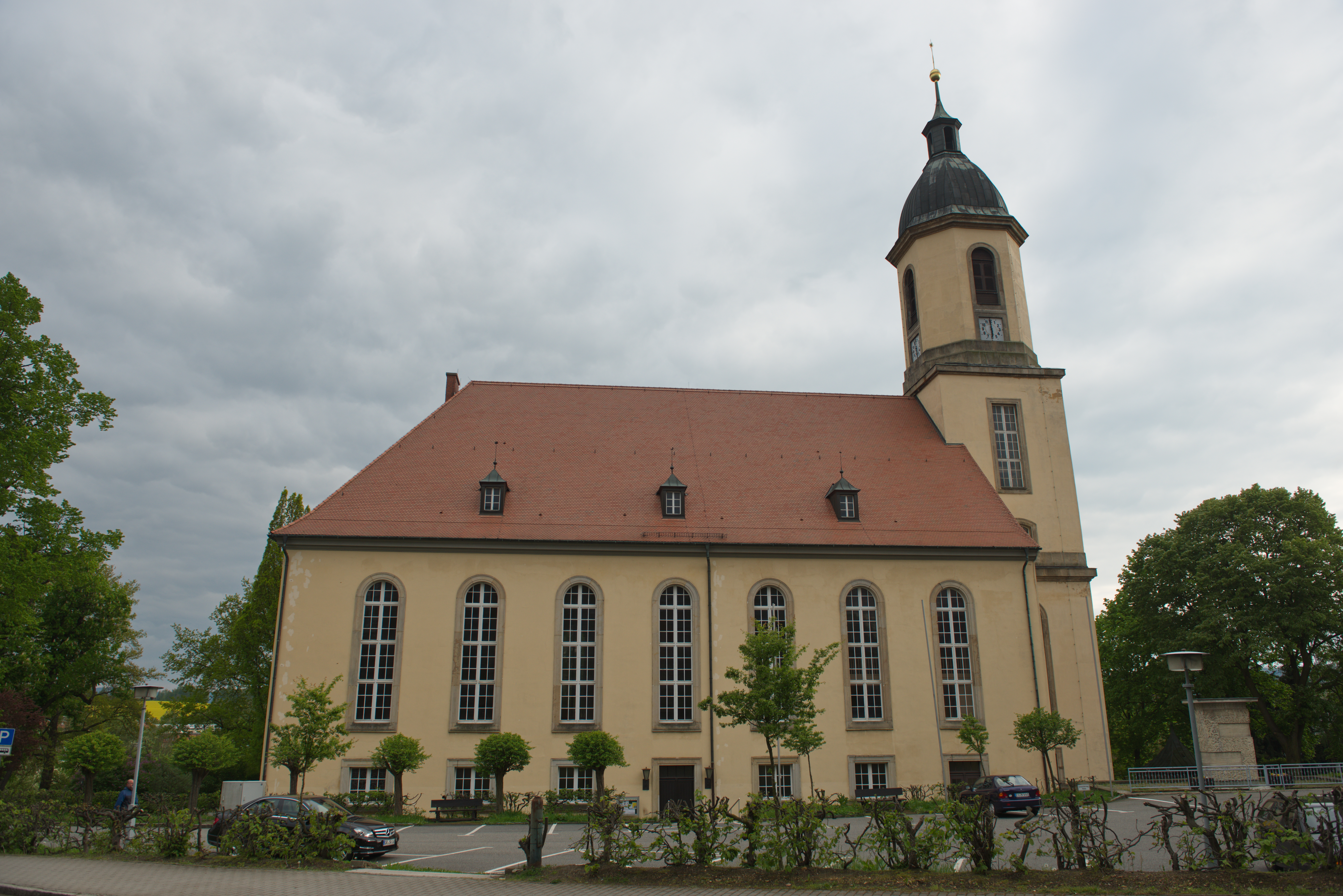 Die Kreuzkirche in Seifhennersdorf. Wikipedians in Seifhennersdorf This photo was taken during the project Wikipedians in Seifhennersdorf in May 2014. Supported by Wikimedia Deutschland, Wikimedia Österreich, Wikimedia Polska and Wikimedia Czech Republic.